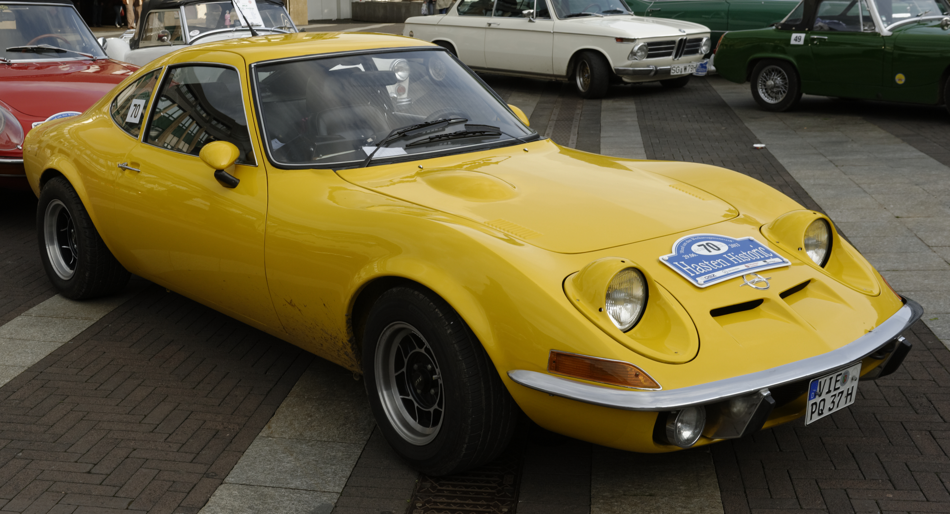 Oldtimershow in Remscheid Juni 2013